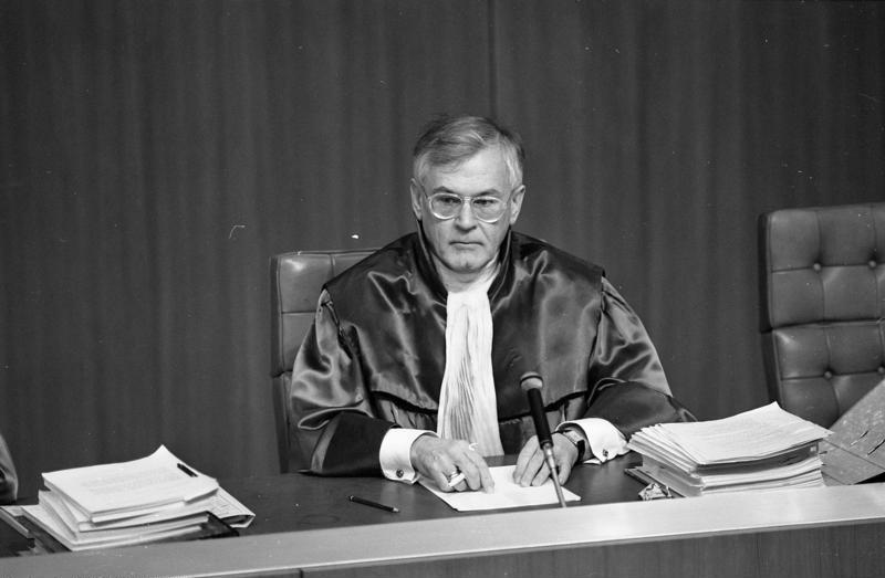 Am 17.1.1989 verhandelte der II. Senat des Bundesverfassungsgerichtes über die Verfassungsmäßigkeit des Bundeshaushaltsgesetzes für 1981. Damals hatte die SPD/FDP-Koalition die Kreditermächtigung für den Haushalt um 1,9 Millarden DM höher angesetzt als die für Investitionen vorgesehenen Ausgaben. Da nach Meinung der damaligen Opposition, der CDU/CSU-Bundestagsfraktion, hiermit gegen Artikel 115 des Grundgesetzes verstoßen wurde, hatten 231 Abgeordete der CDU/CSU-Fraktion am 6.9.1982 den Antrag beim Bundesverfassungsgericht gestellt, die Bestimmung über die damalige Kreditermächtigung für verfassungwidrig zu erklären. Artikel 115 verpflichtet, die Verschuldung unterhalb der für Investitionen vorgesehenen Ausgaben zu halten. Die Entscheidung in diesem "Abstrakten Normenkontrollverfahren" soll am 18. April 1989 verkündet werden.